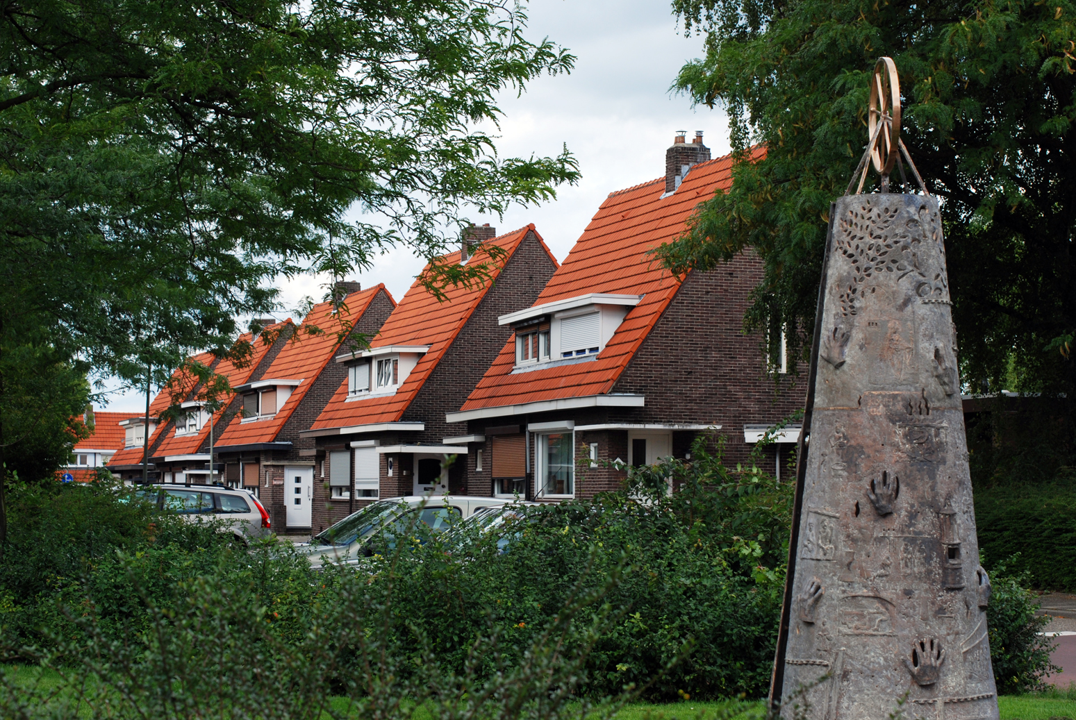 Een groepje woningen aan de Olmenstraat te Lauradorp. Gebouwd tussen 1927 en 1931. Ontworpen door architect Jan Drummen en gebouwd door Stichting Thuis Best. Op de voorgrond het Monument Lauradorp